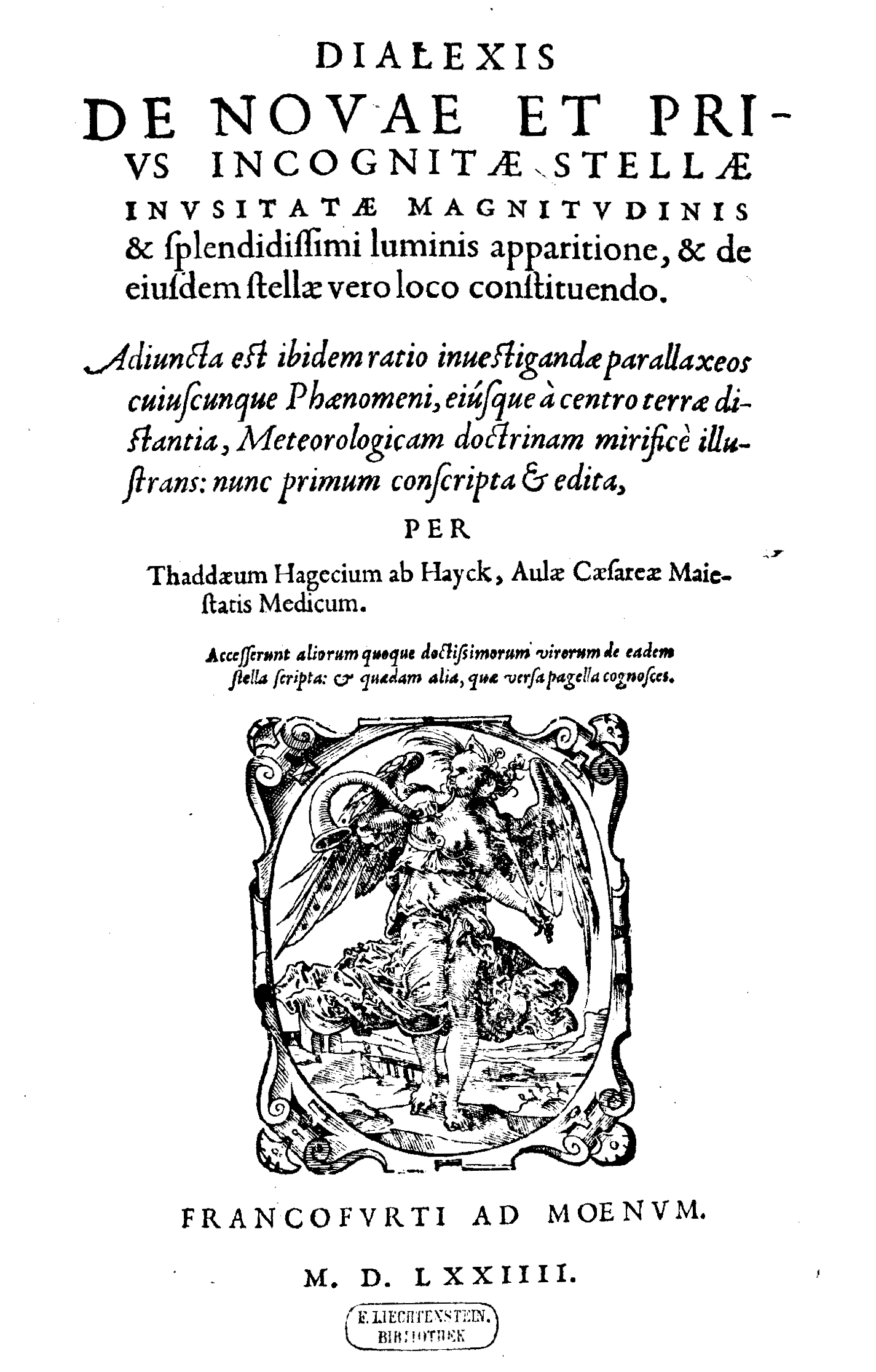 Frontespizio